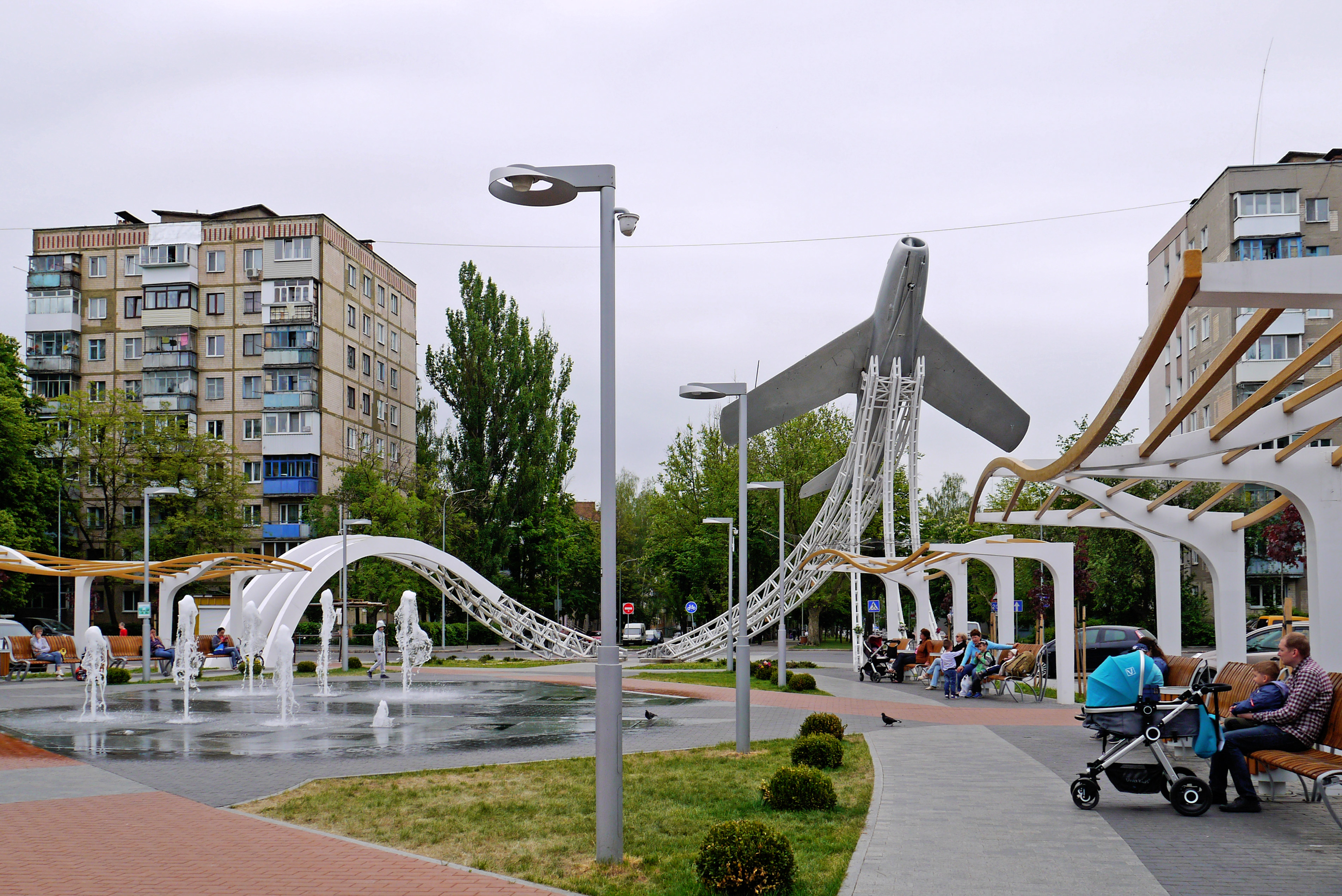 Пам'ятник радянським льотчикам, загиблим при звільненні міста, Вінниця, пр-т Космонавтів